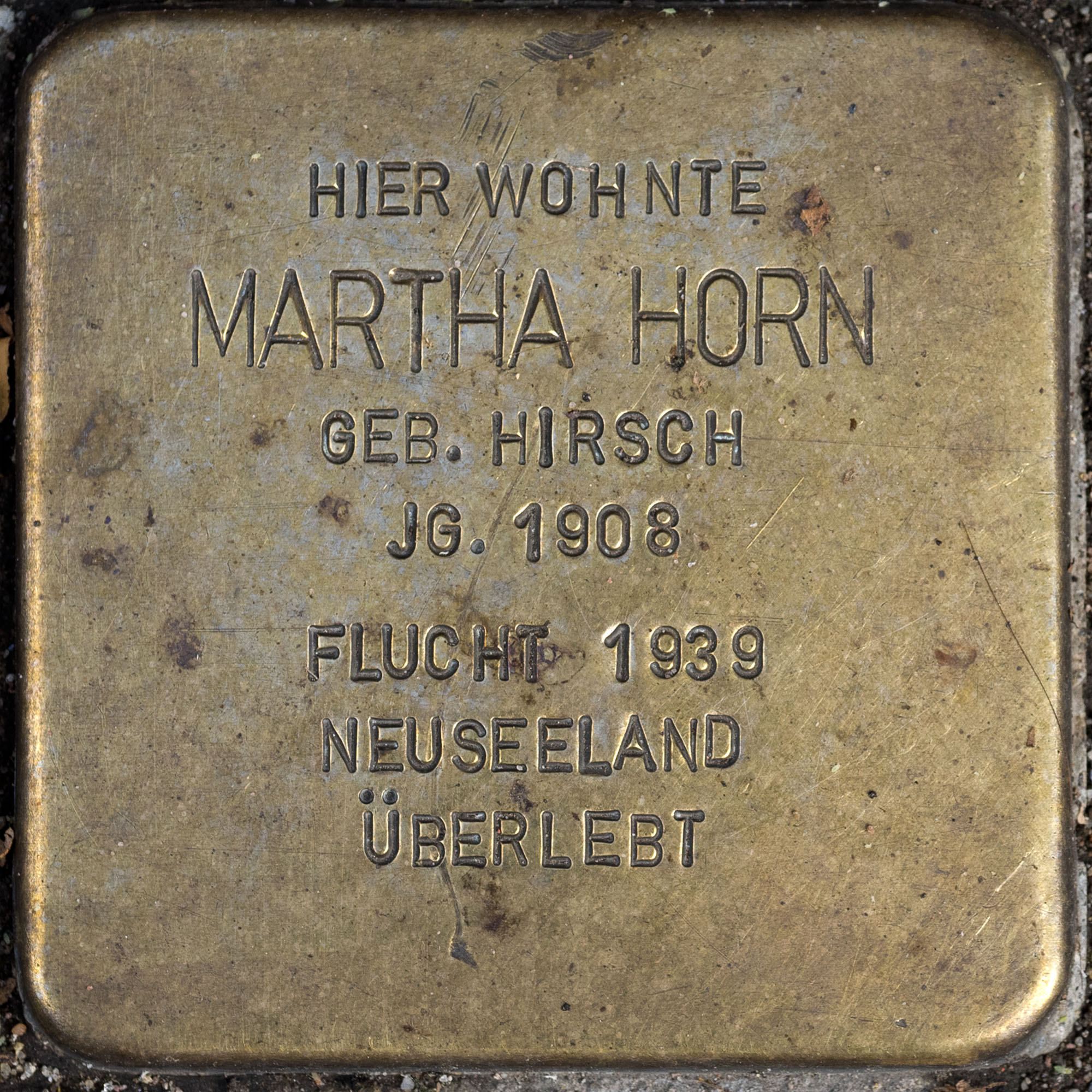 2016 Stolpersteine ToeVo Horn Martha